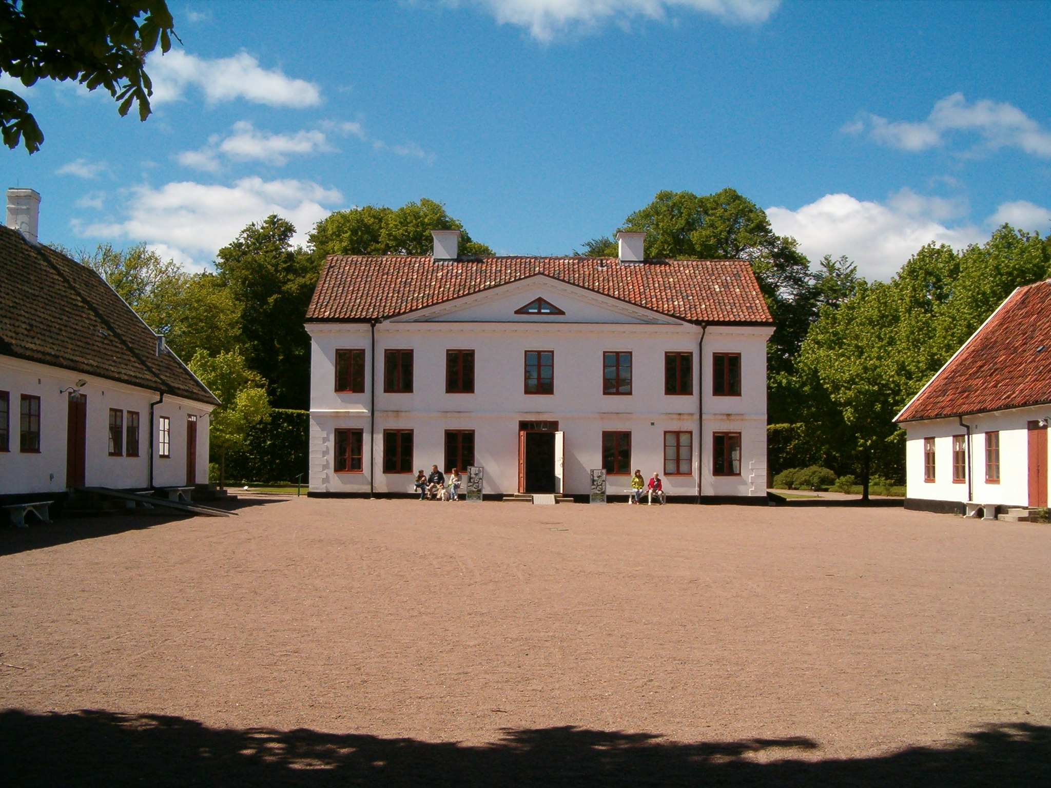 Fredriksdals herrgård sedd från öster.